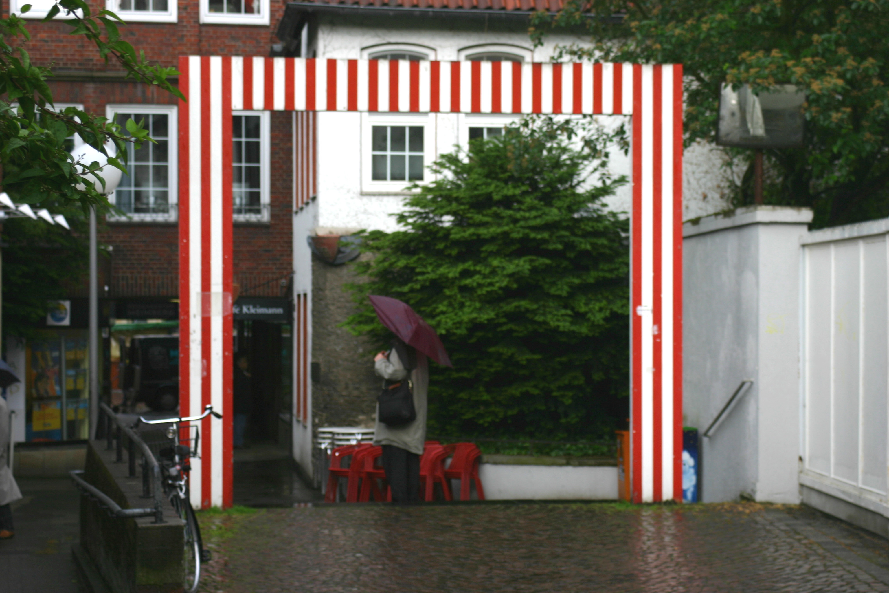 Daniel Buren - Tor (Projekt Vier Tore) 1987 - Standort:Domgasse